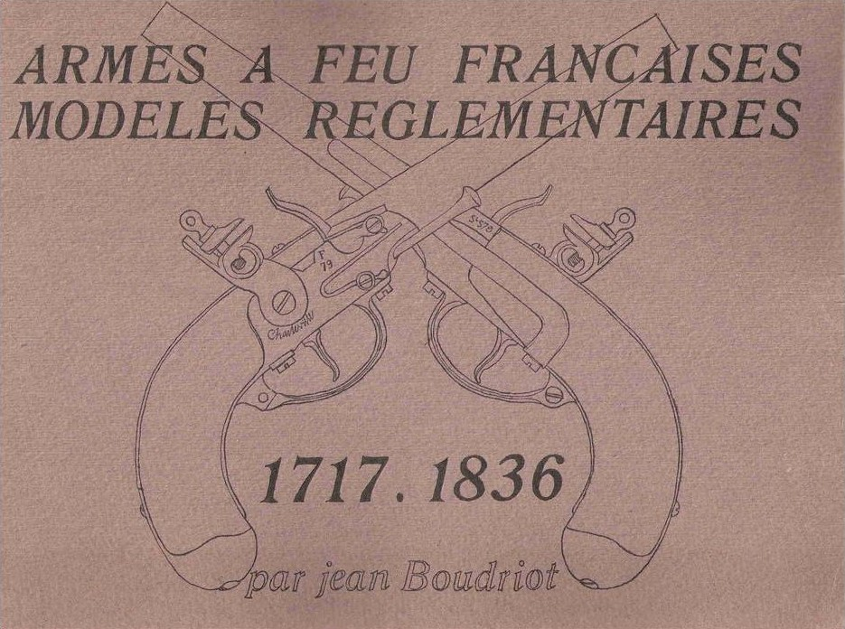 Couverture de l'ouvrage "Armes à feu, modèles réglementaires" de J. Boudriot